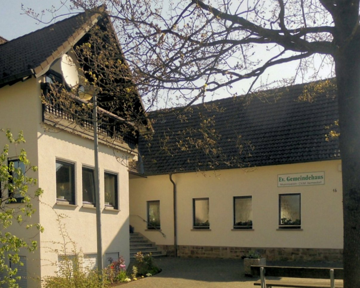 CVJM-Haus in Hermesdorf, Oberbergischer Kreis, Nordrhein-Westfalen, Deutschland